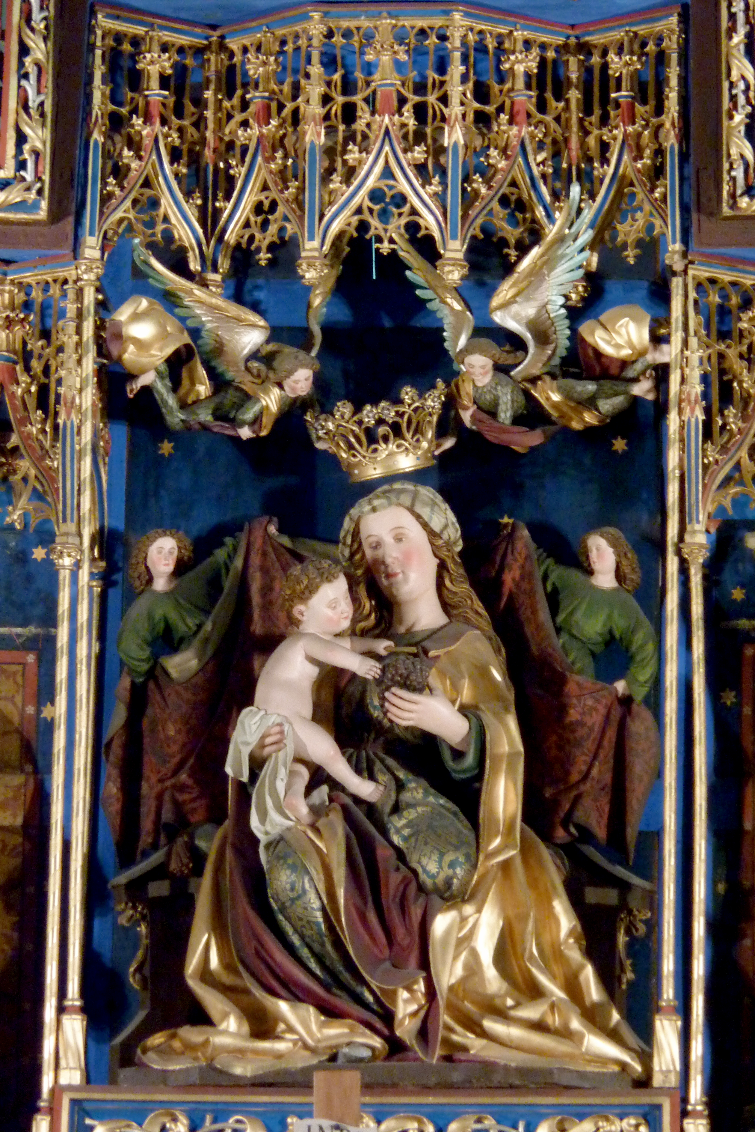 Evangelische Stadtkirche St. Blasius in Bopfingen, einer Stadt im Ostalbkreis (Baden-Württemberg), Flügelaltar von Friedrich Herlin, von 1472, Mittelbild des Schreines mit der Schnitzfigur einer Madonna mit Kind, von einem oberrheinischen Meister (in der Nachfolge von Niclas Gerhaert van Leyden)